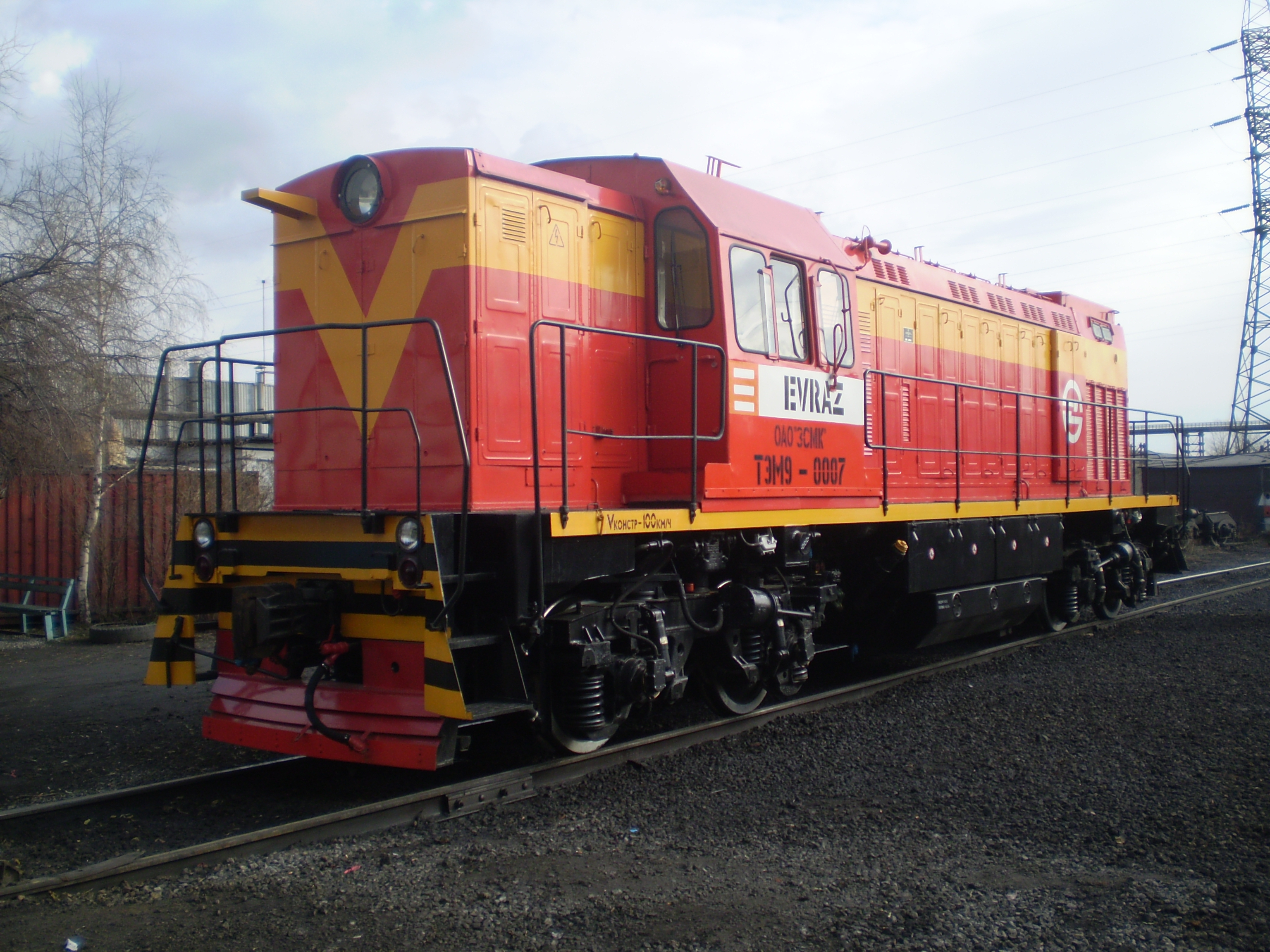 Тепловоз ТЭМ9, Людиновского тепловозостроительного завода. Фотография сделана в 2010 году на металлургическом комбинате г.Новокузнецка, цифровой фотокамерой Olympus FE-210 с разрешением 7.1 Мпкс.